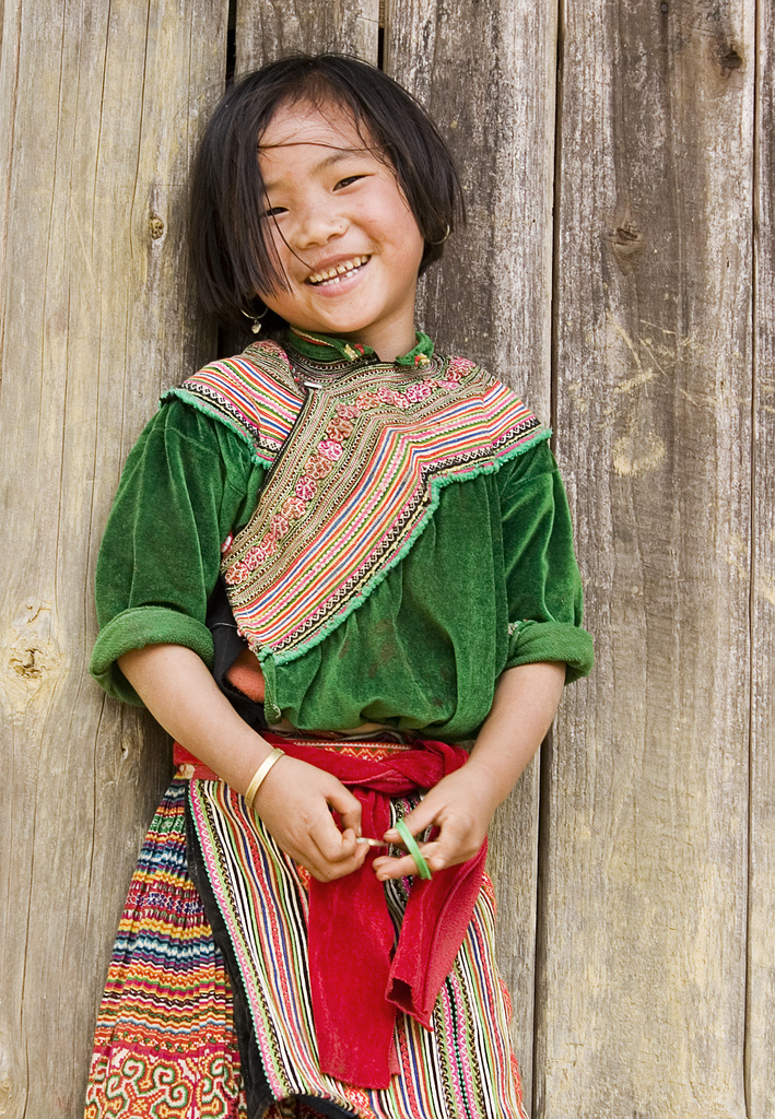 Smile